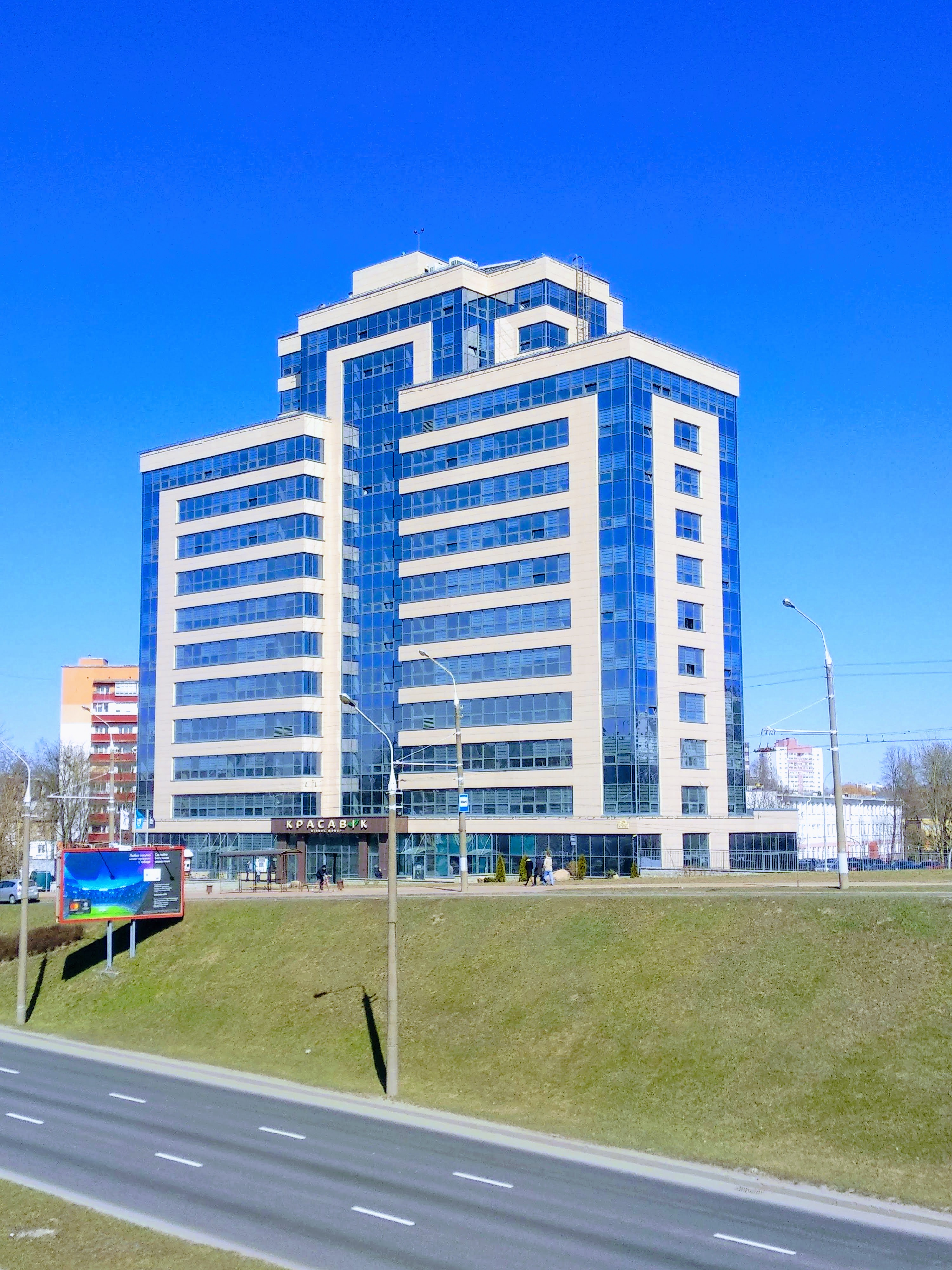 Бізнес цэнтр "Красавік", праспект Жукава 29, Мінск